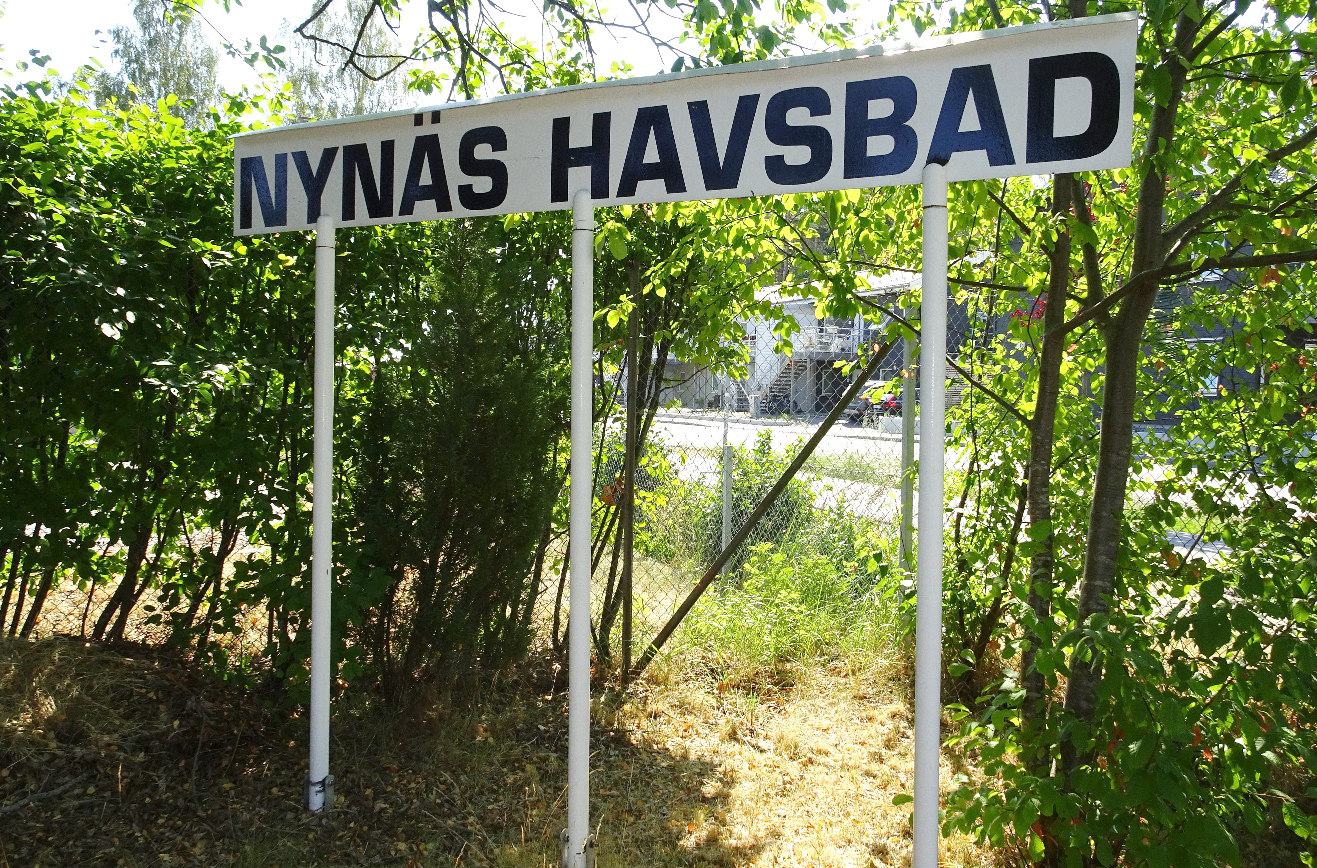 Nynäs Havsbad stationsskylt